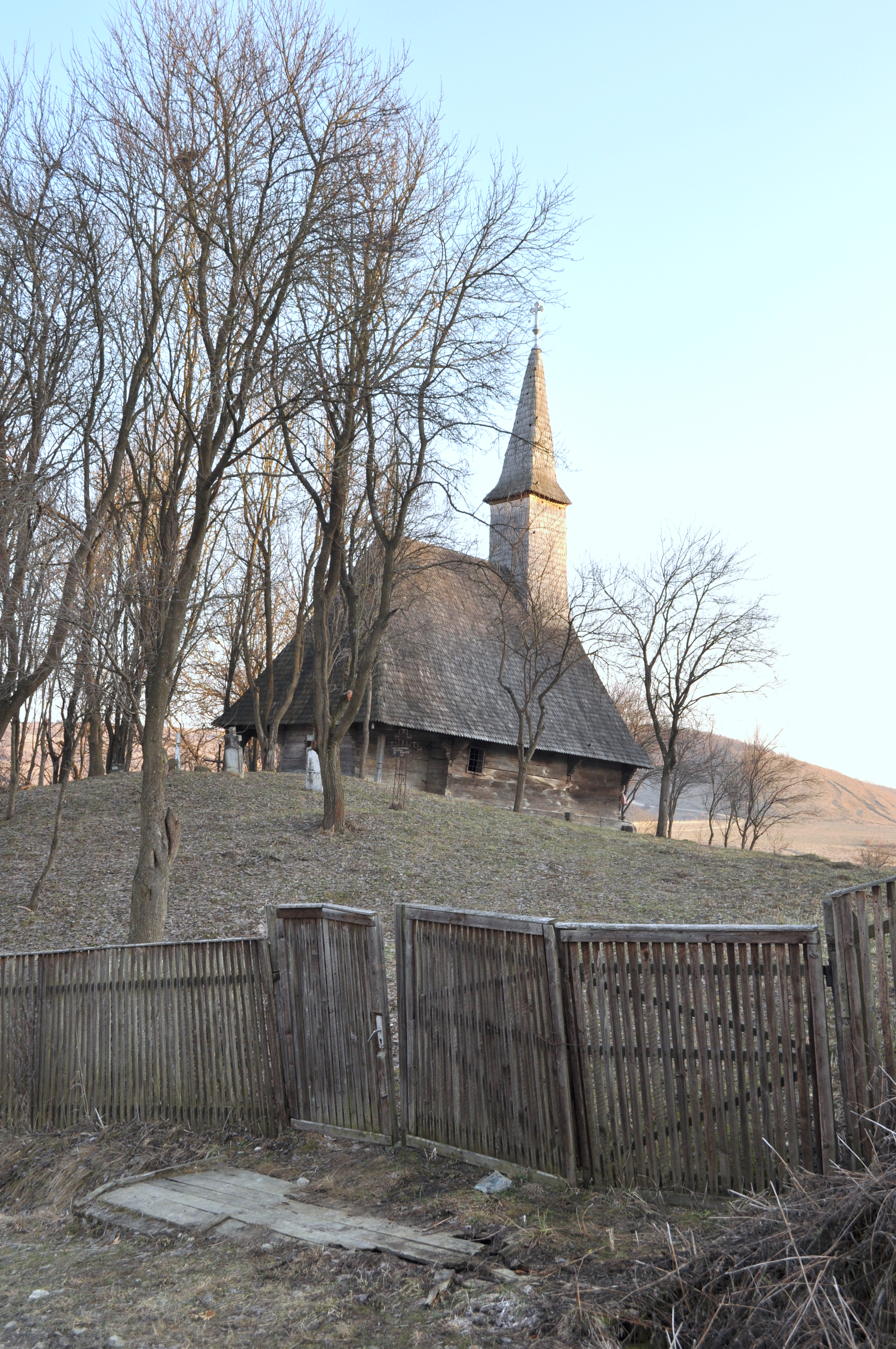 Biserica de lemn "Sfinții Arhangheli Mihail şi Gavriil, sat CALNA; comuna VAD, județul Cluj